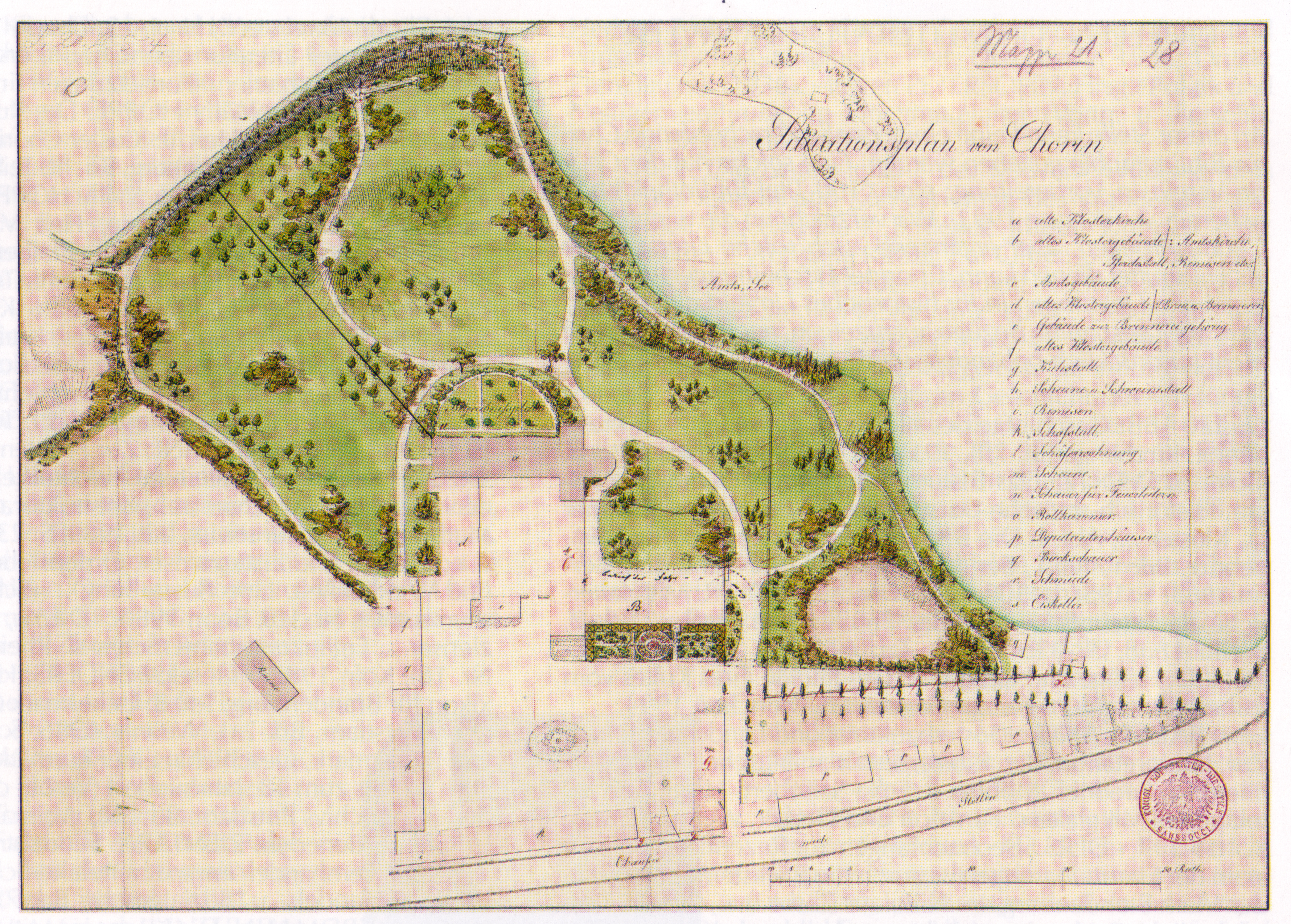 Lageplan Neugestaltung Klosterumgebung Kloster Chorin